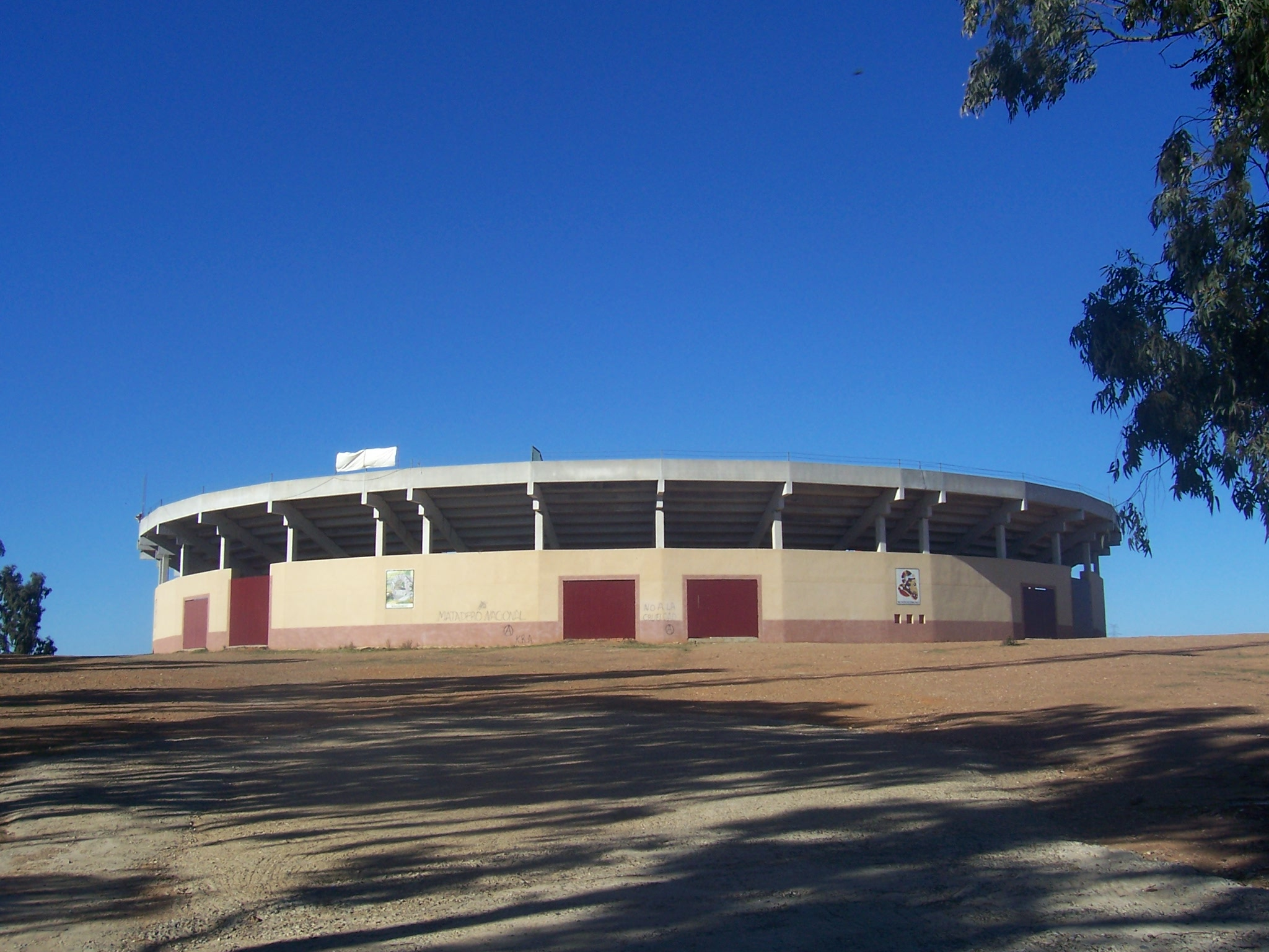 plaza de toros de Montehermoso, Cáceres, España